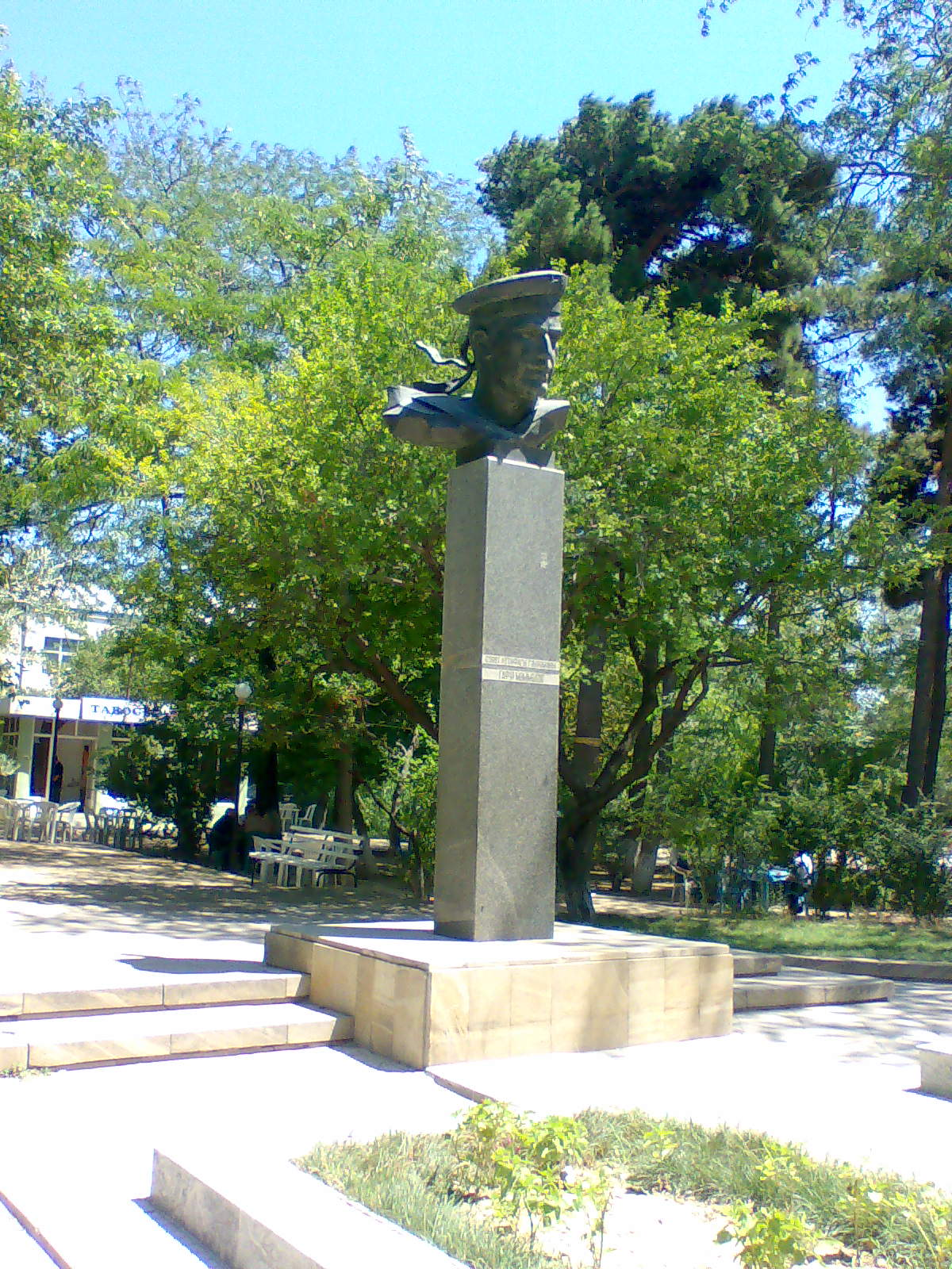 Памятник Гафуру Мамедову в Баиловском саду, Азербайджан, Баку